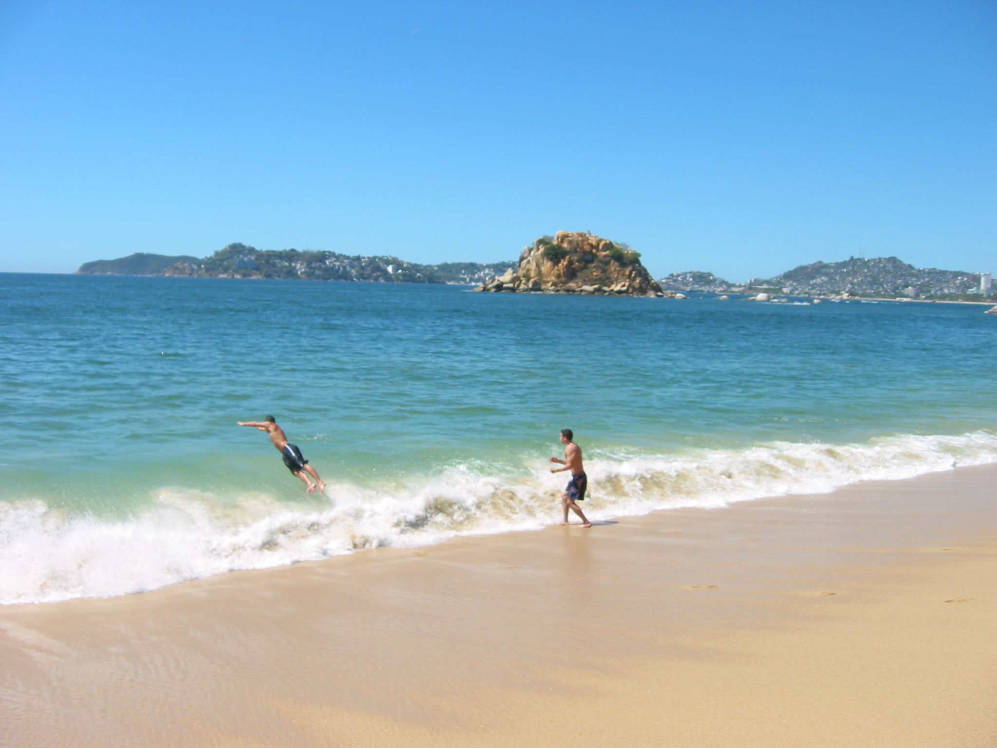 Playa La Condesa en Acapulco, Guerrero, México.